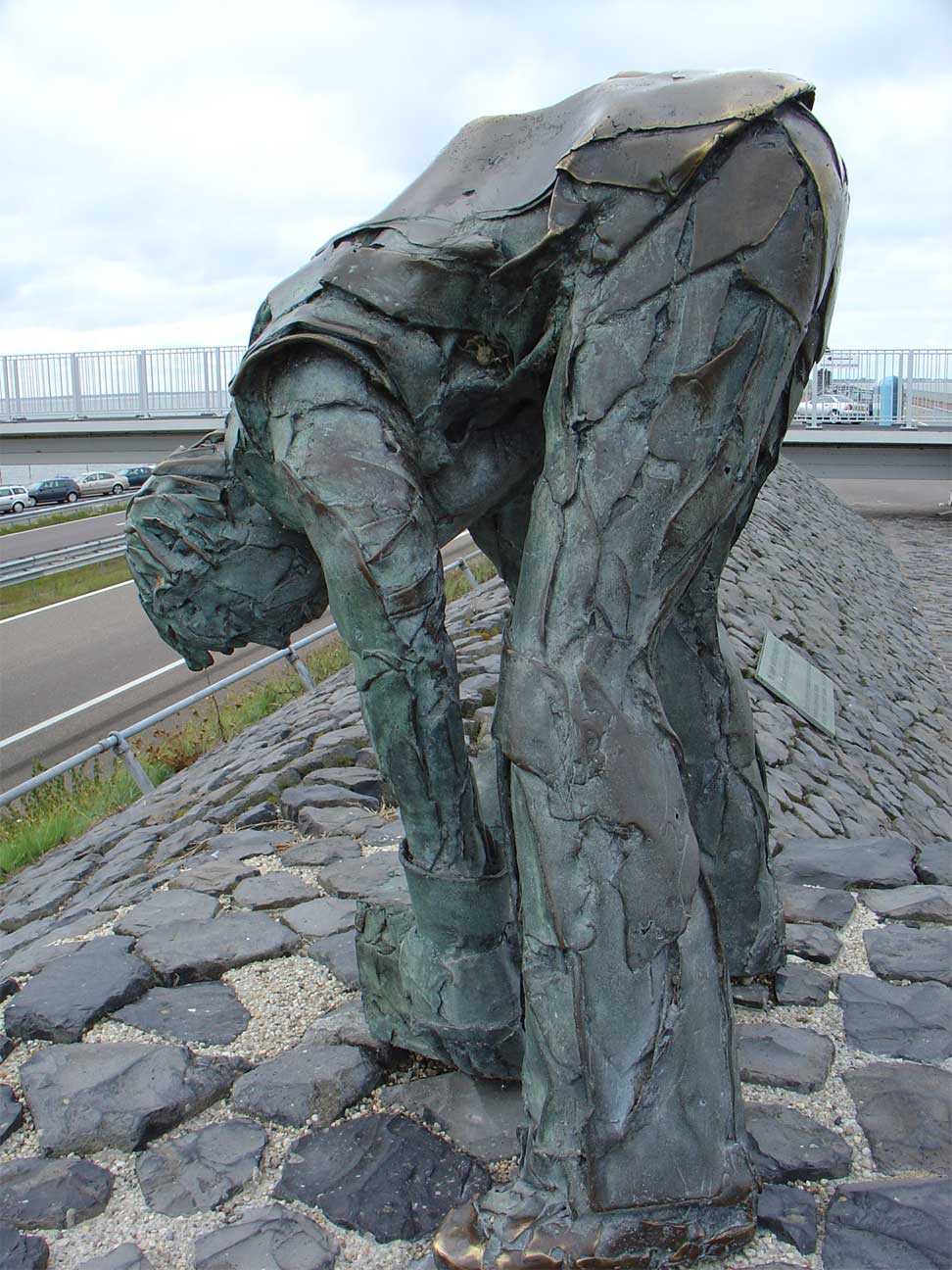 Standbeeld dijkwerker op de Afsluitdijk